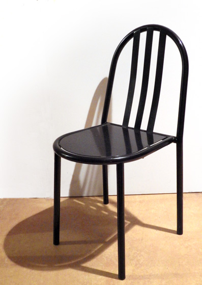 Petite chaise en tube d'acier à dossier cintré, créée par Robert Mallet-Stevens pour la Villa Cavrois